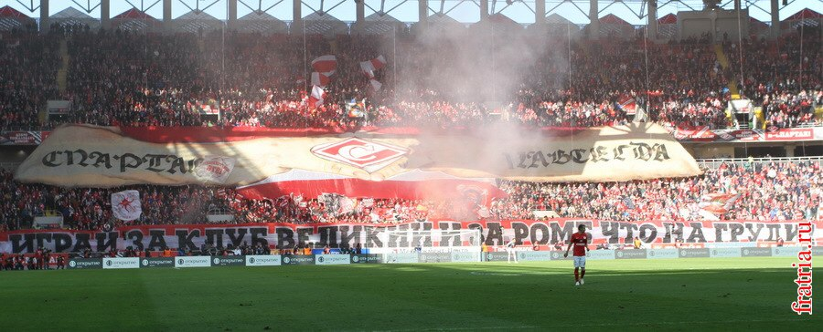 Перформанс с изображением спартаковской футболки с ромбиком на груди